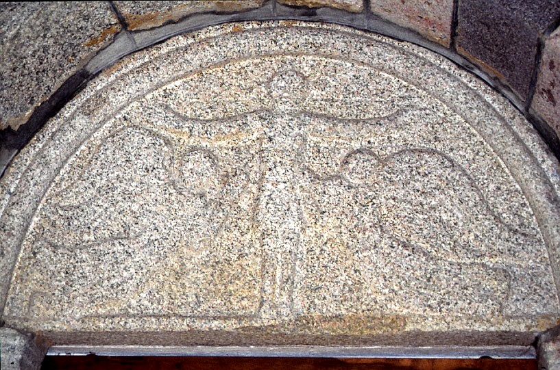 Tulstrup Kirke, Skanderborg Kommune - Tympanon over sydportal